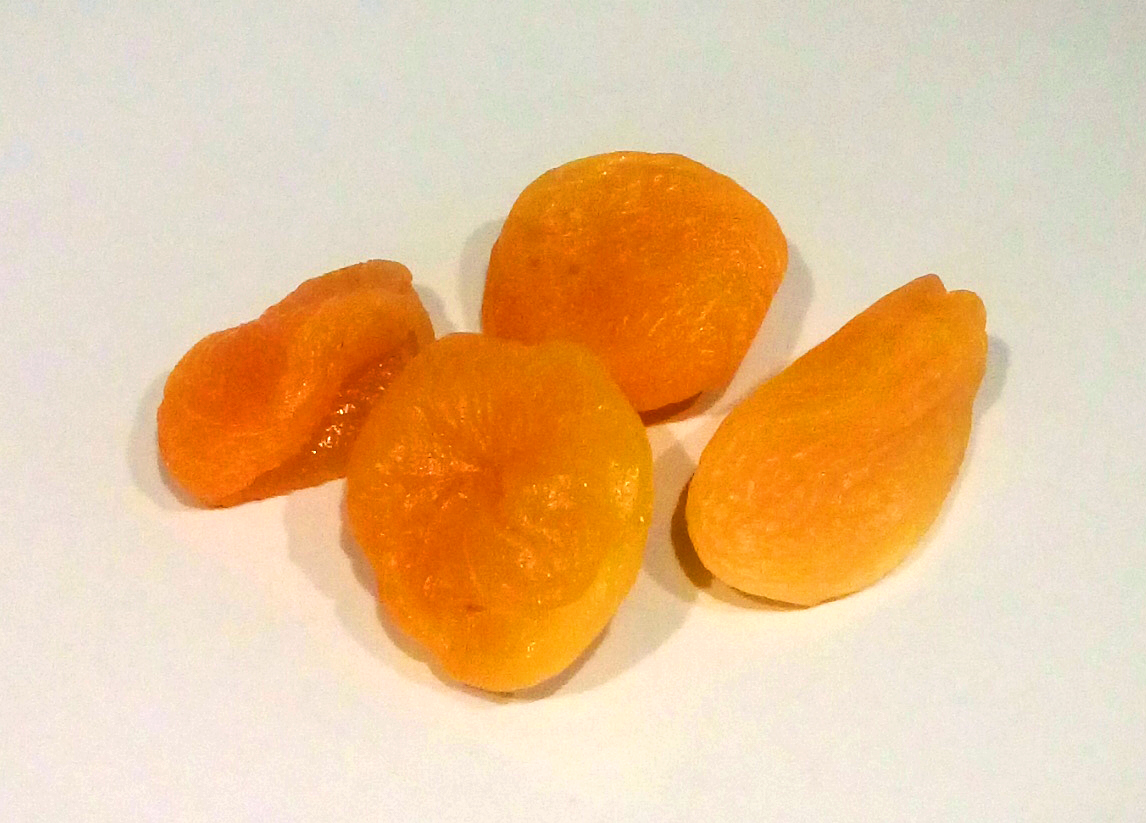 Orejones: Albaricoques deshidratados